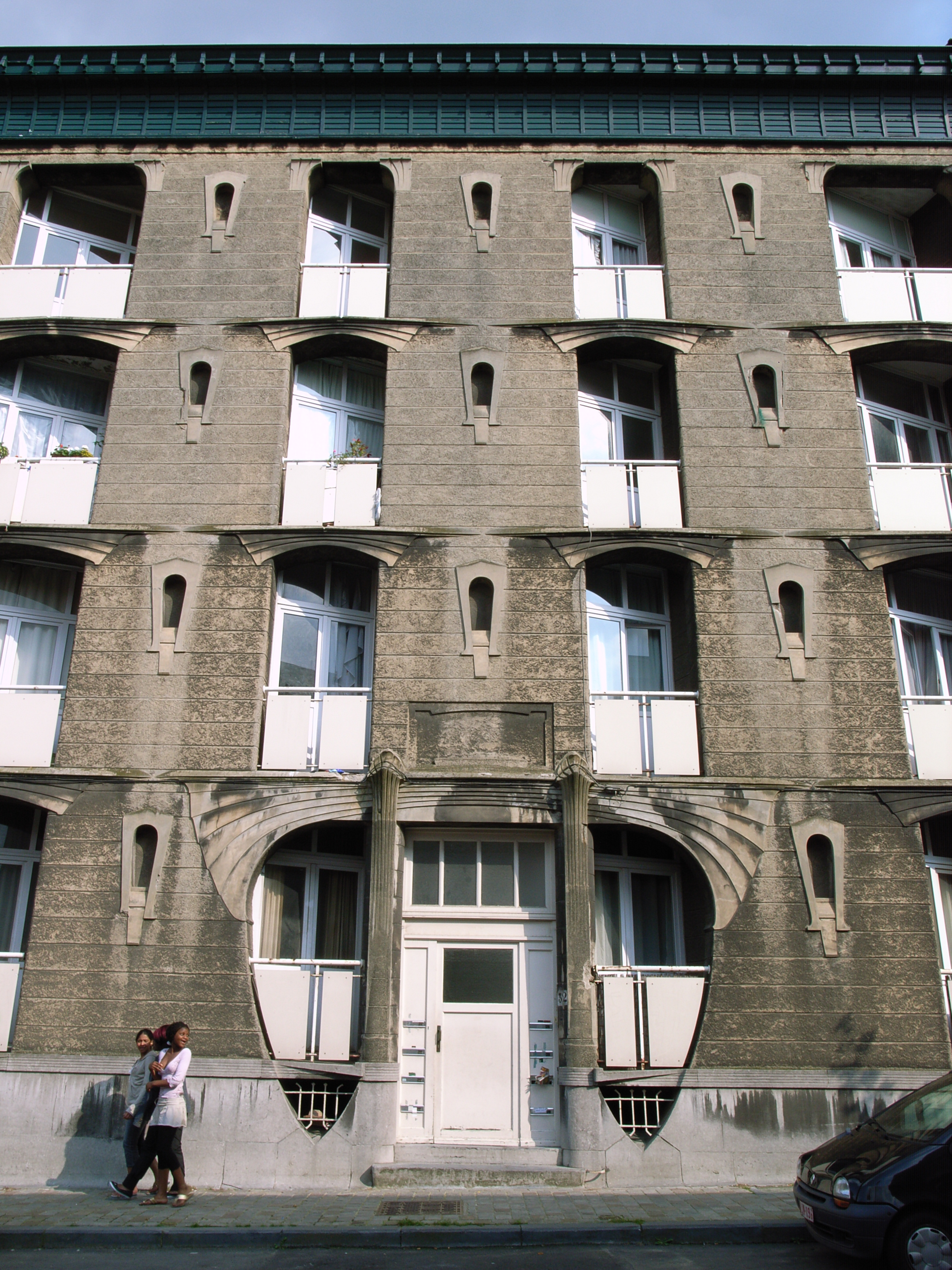 Rue Marconi 32-40, Forest (Bruxelles), Belgique. Habitations ouvrières Art Nouveau (1901). Architecte : Léon Govaerts